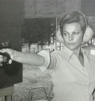 María Luisa Peña Tabernero en una sesión de tiro